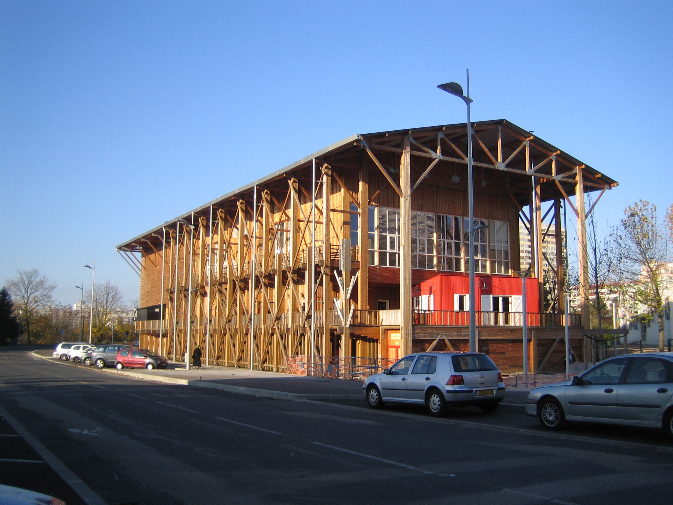 CCN Rillieux-la-Pape